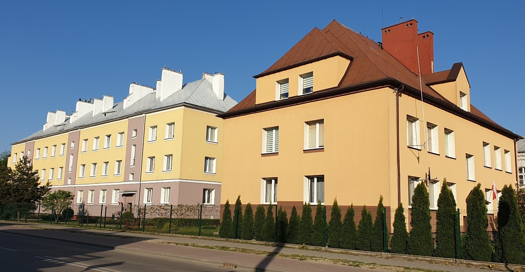 Osiedle wojskowe Przasnysz